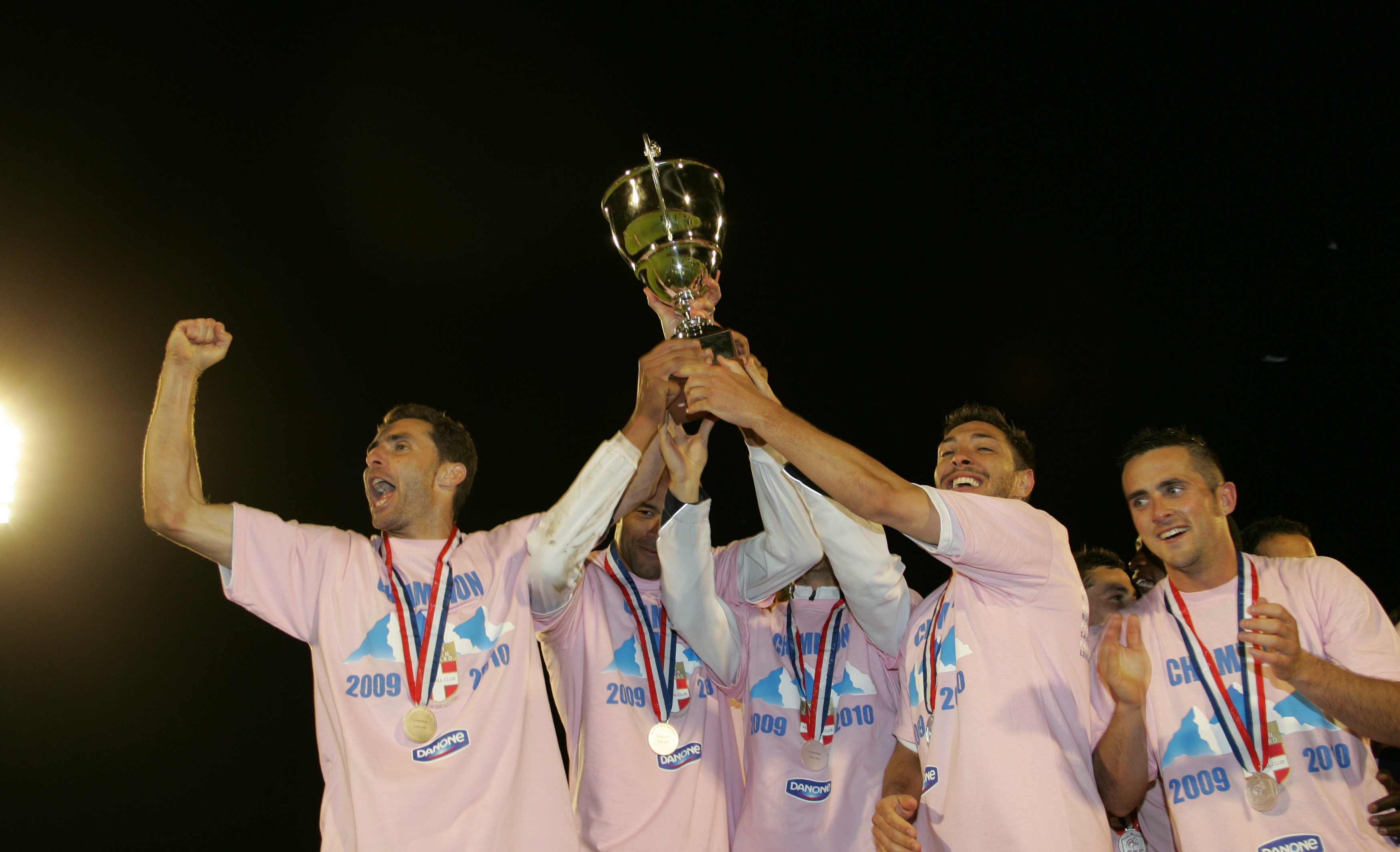 Evian Thonon Gaillard champion de National